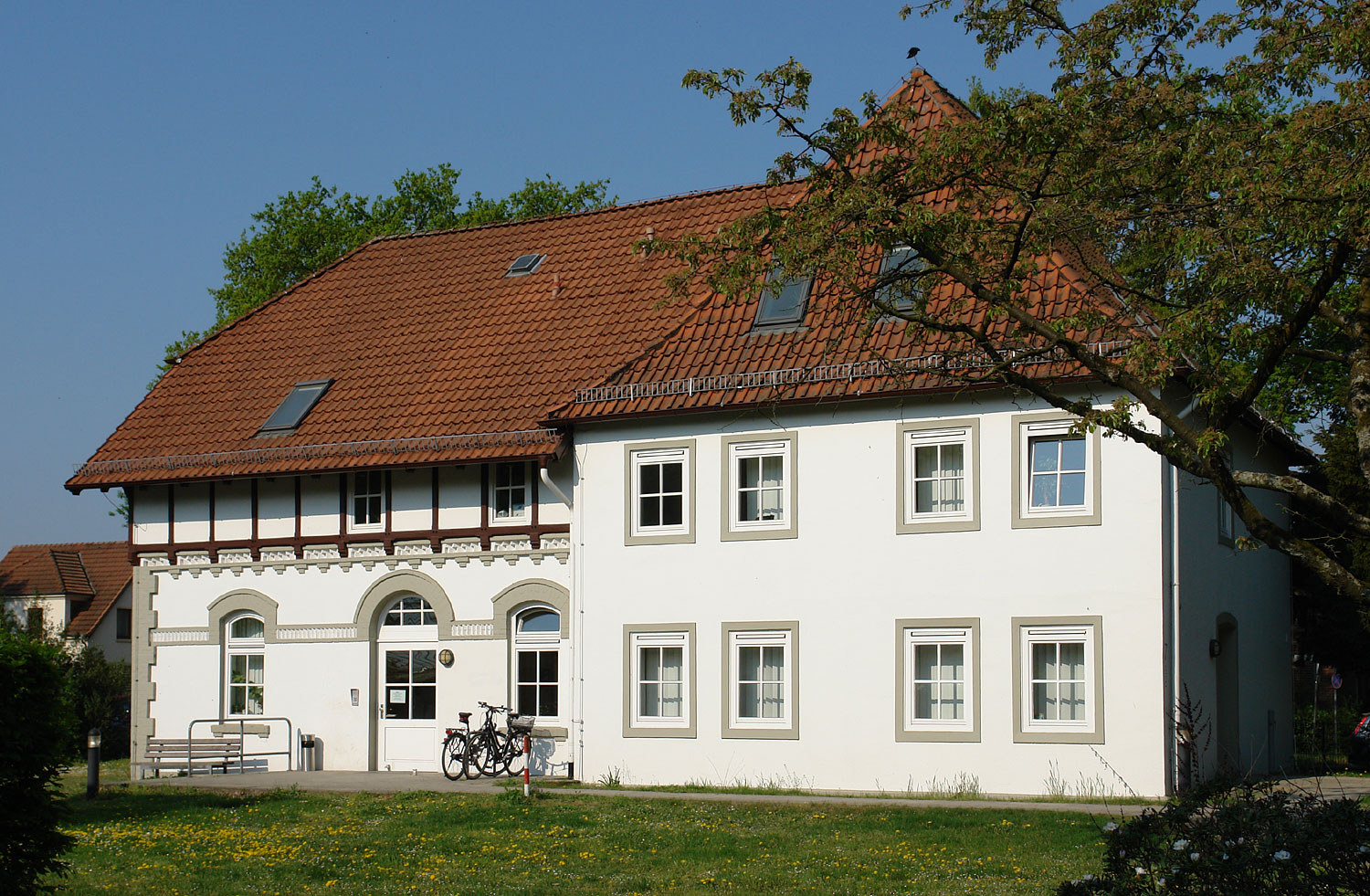 Klinikum Bremen-Ost, Haus 7. Ehemals St. Jürgen Asyl, Haus XV-XIX. Herstellung 1900–1904. Funktion: Wärterwohnung Das abgebildete Objekt ist ein geschütztes Kulturdenkmal in der Freien Hansestadt Bremen, mit der Nr. 1672 beim Landesamt für Denkmalpflege registriert.